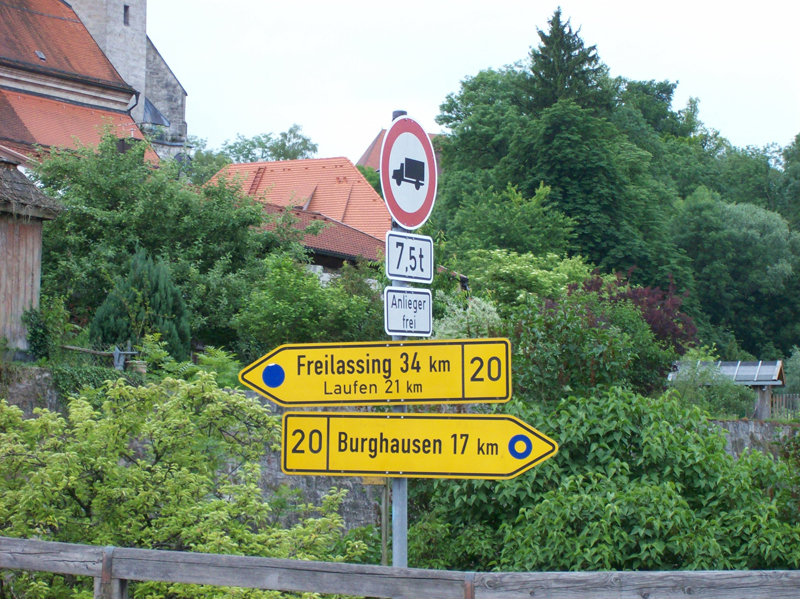 Straßenschild an der Bundesstraße 20 in Tittmoning (Bayern, Deutschland). Die blauen Punkte auf den Wegweisern wurde 1972 vor den Olympischen Spielen in München zur Umleitung des Fernverkehrs angebracht.